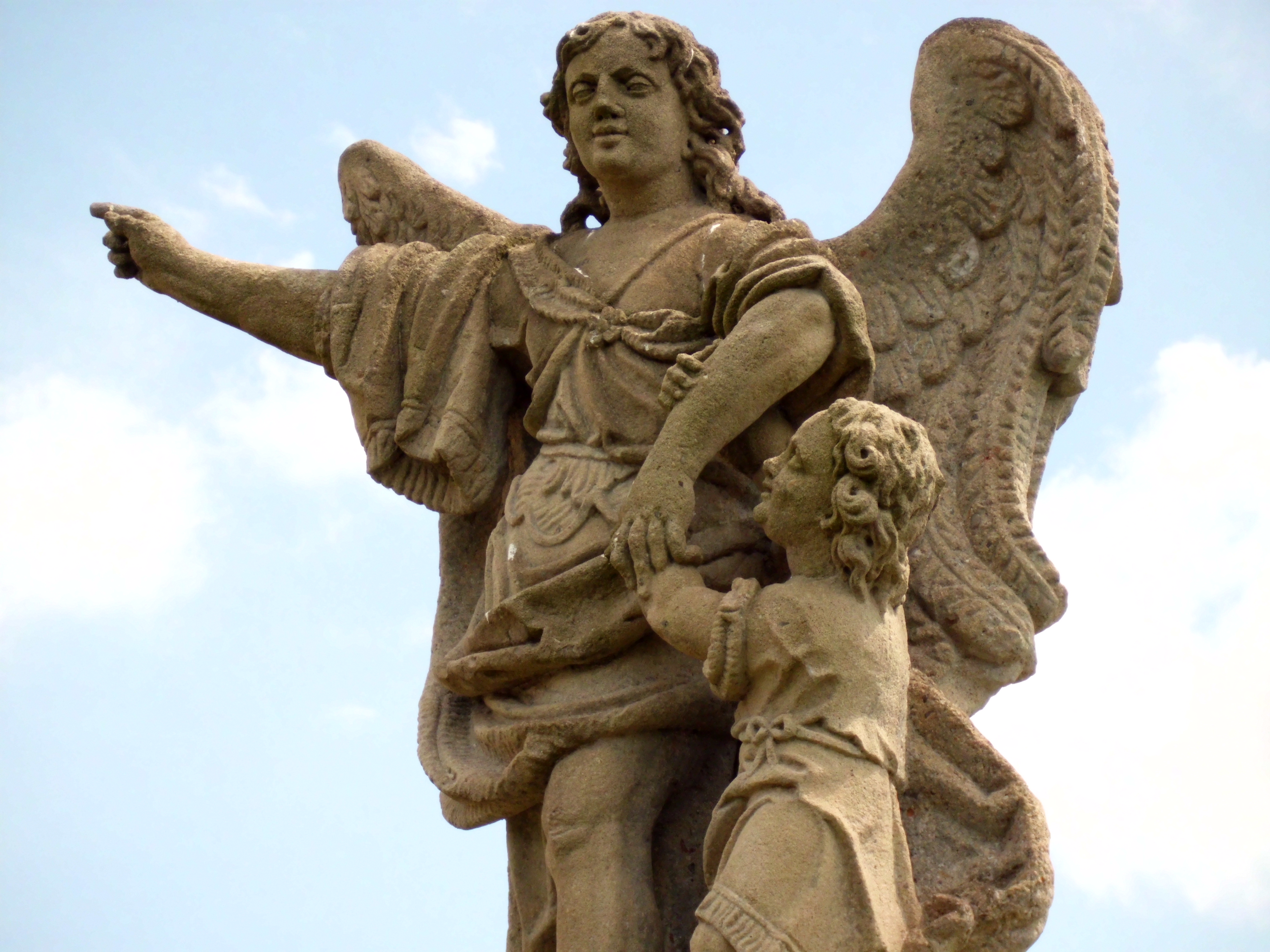 Proboštství s kostelem Zvěstování P. M., ambity a sochami sv. J. Nep. a sv. Arch. Rafaela (Mariánský Týnec), Mariánský Týnec 1, Mariánský Týnec